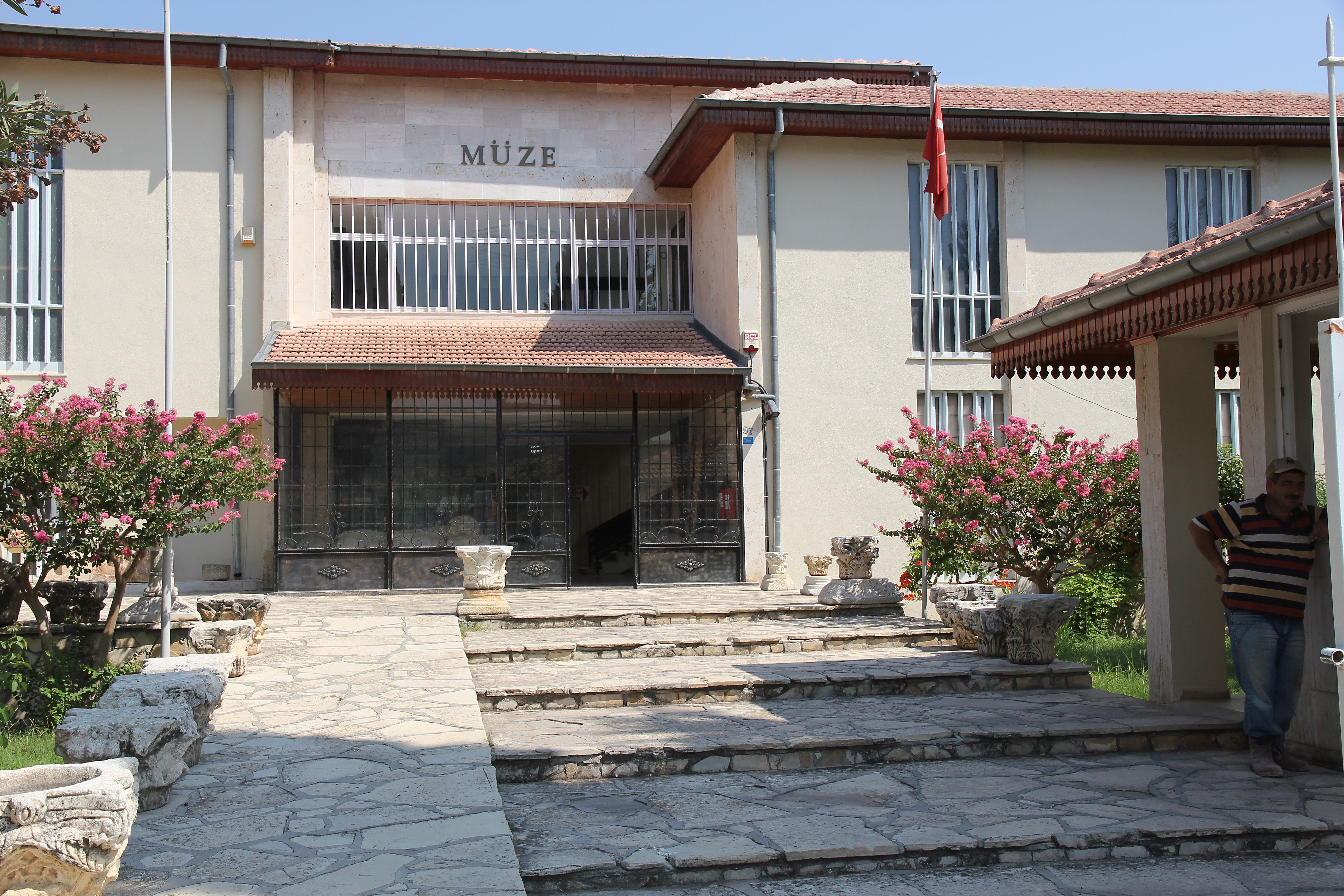 Archäologisches Museum Silifke, Südtürkei, Eingang